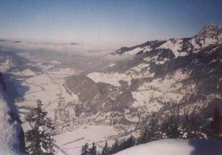 Blick aus dem Sudelfeld in Richtung Bayrischzell'